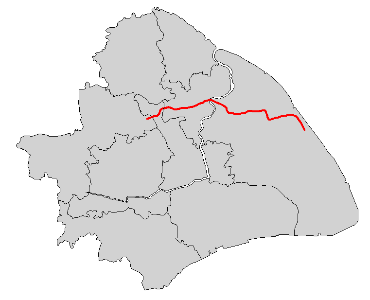 上海轨道交通2号线简图（2010年） 本地图的底图不表示上海市全部所辖区域 因版面关系，上海市所辖之崇明岛、长兴岛等与本线路无关的离岛未在本图中表示。